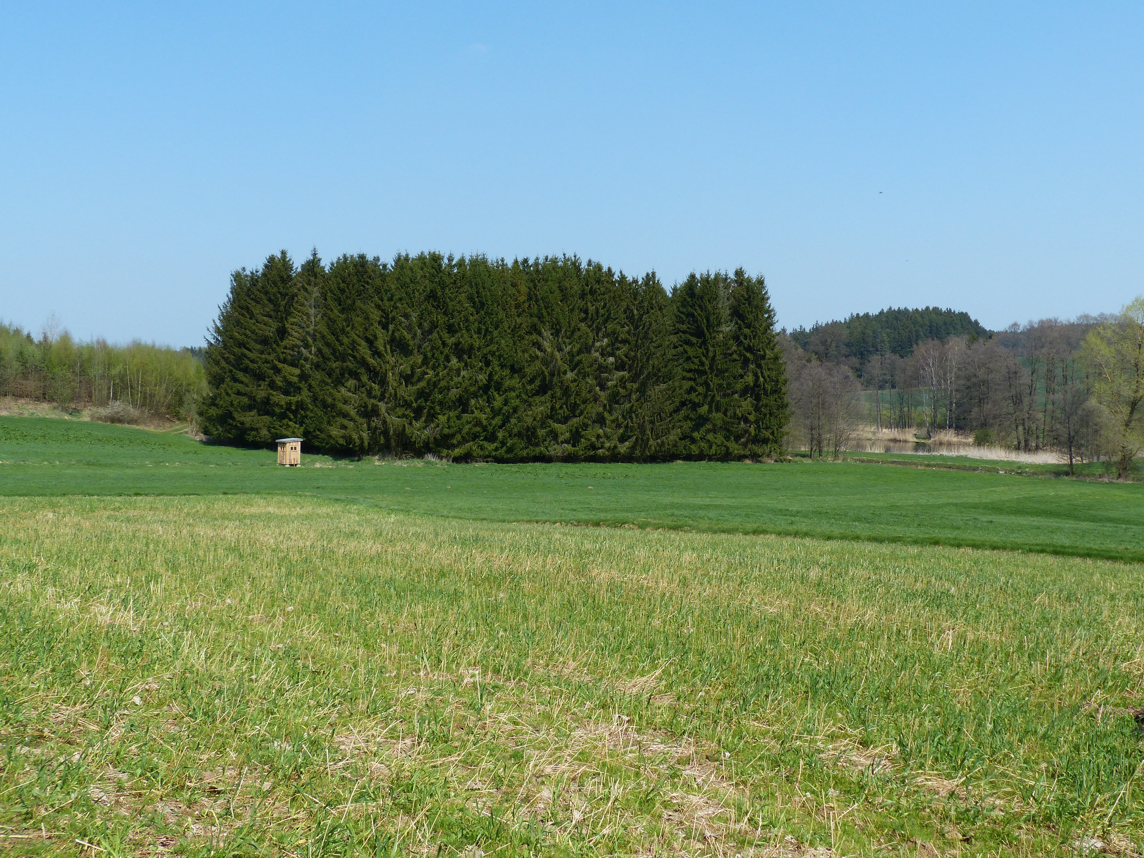 Wüstungsareal Dürregrün